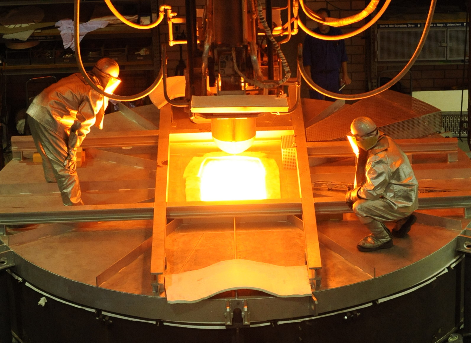 Spiegelguss Bild 393